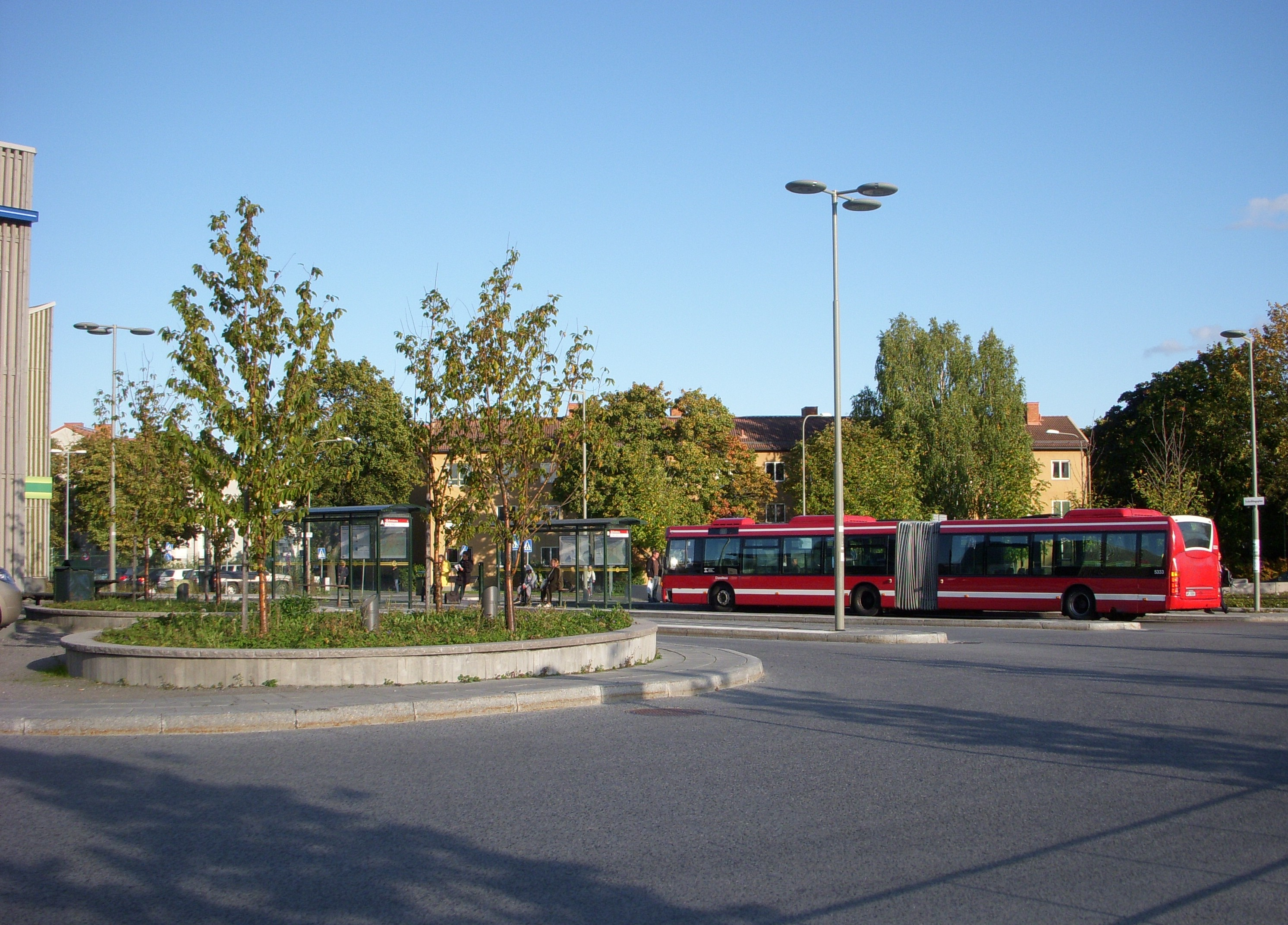 Bussterminalen "Årstaberg", Stockholm